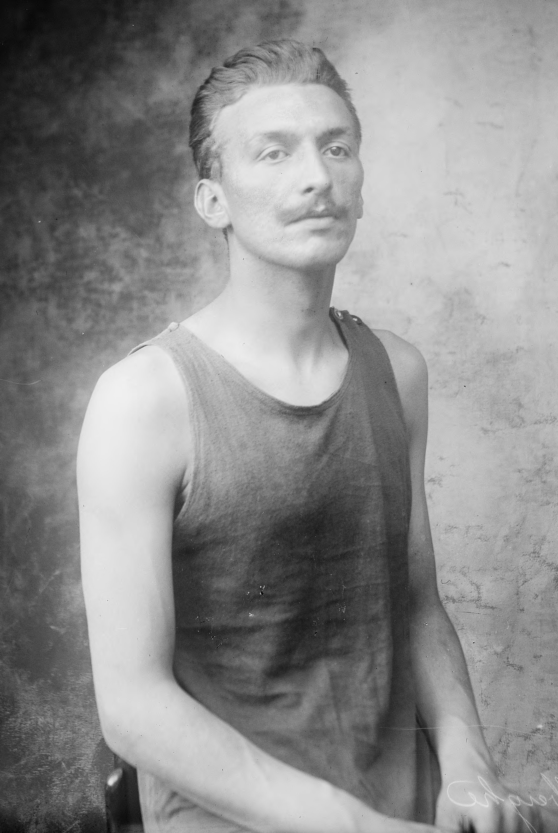 Noël Delberghe [joueur de water-polo français].